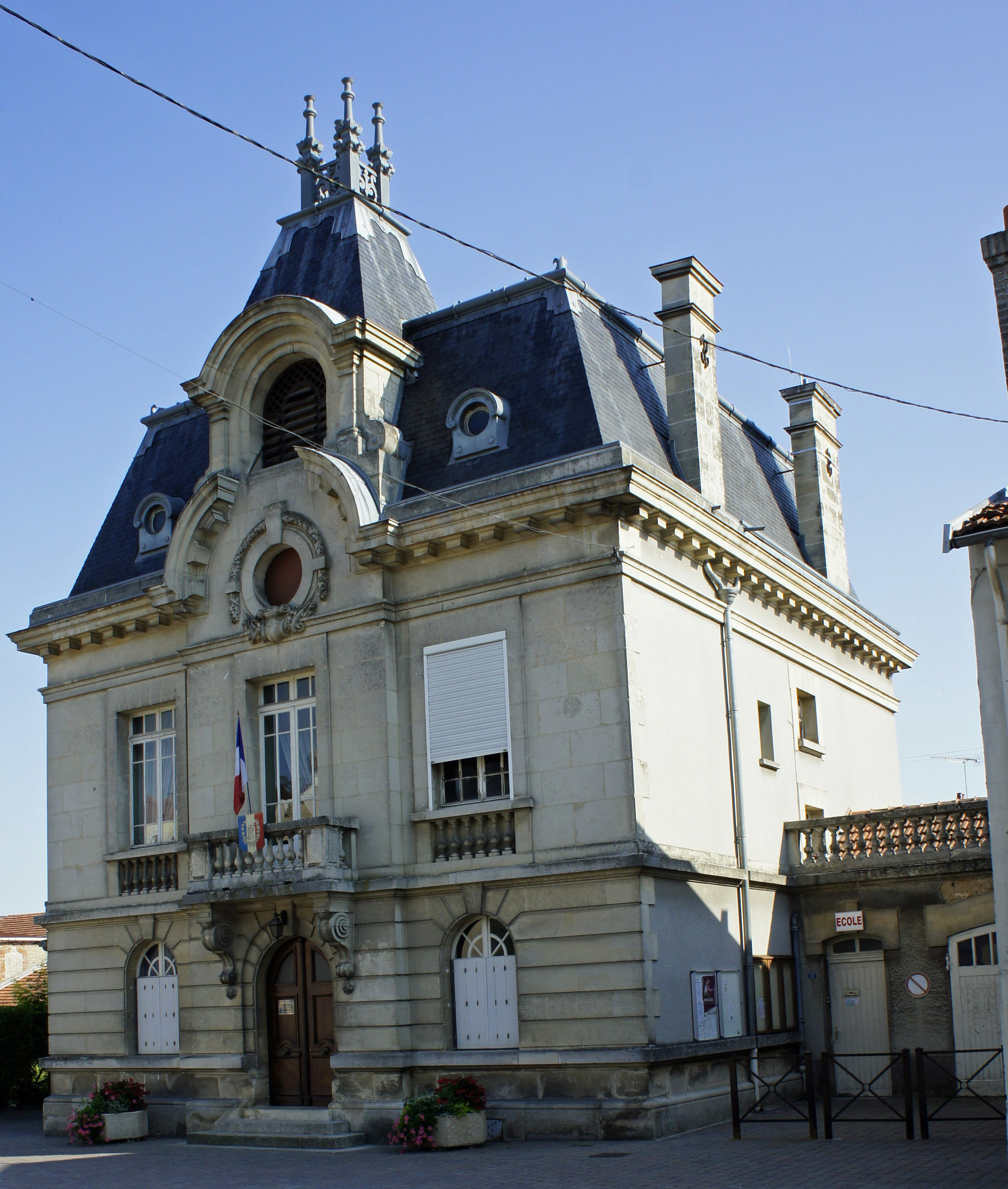 La mairie de Berru.